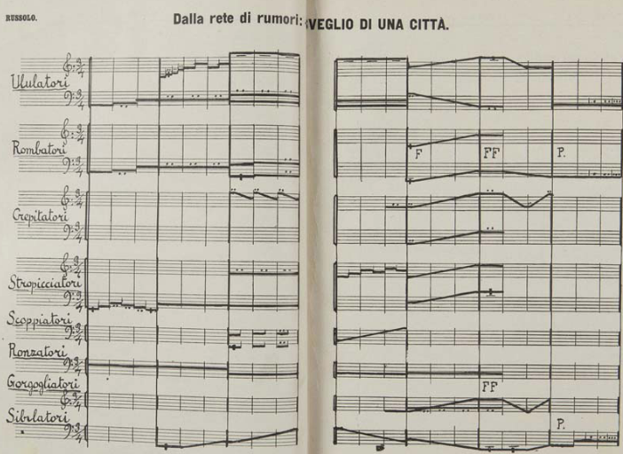 Энгармоническая нотация для интонарумори (автор - Луиджи Руссоло, произведение - "Risveglio di una Citta"), 1914